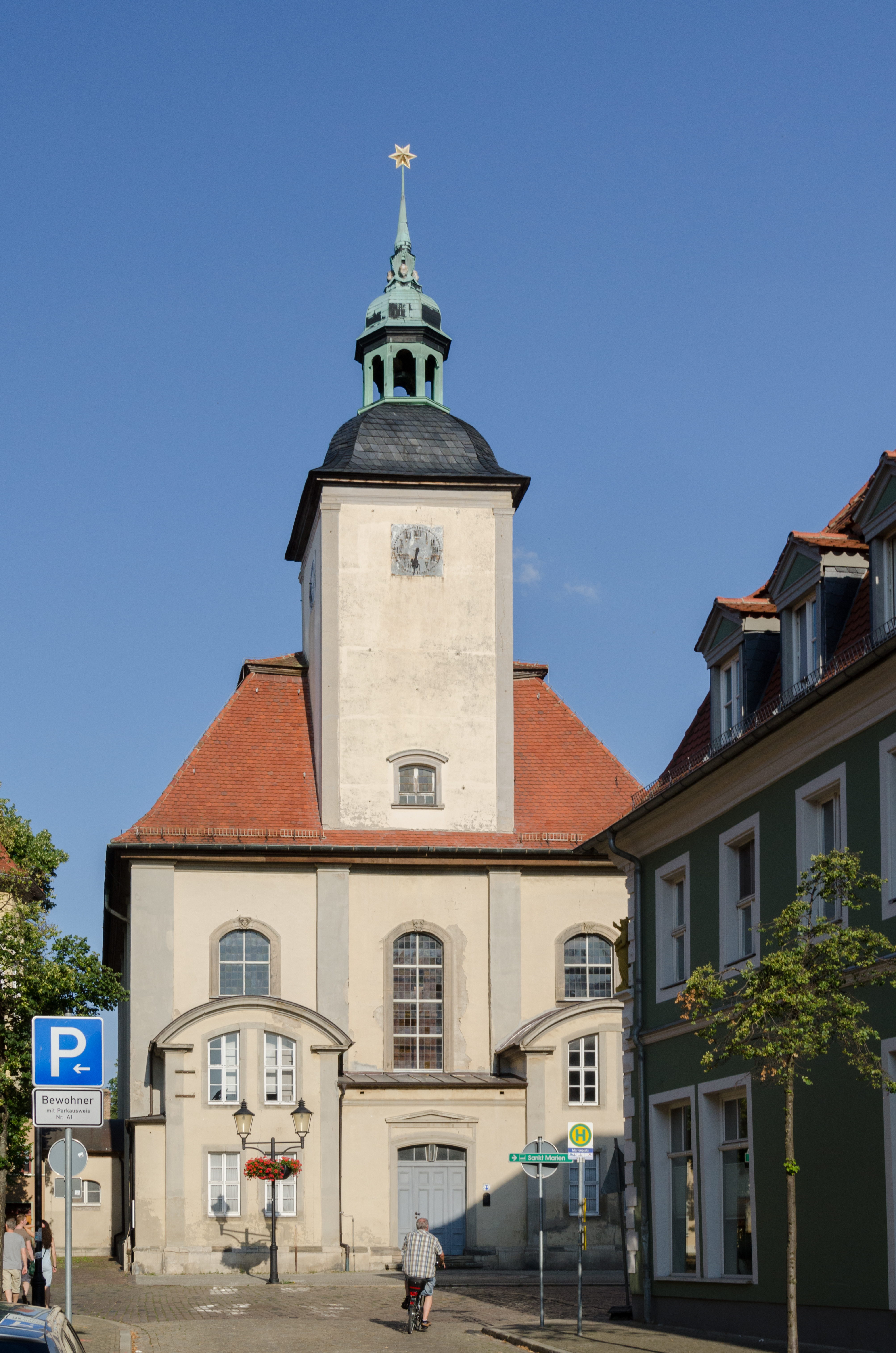 Naumburg, Marienplatz, St. Maria Magdalena